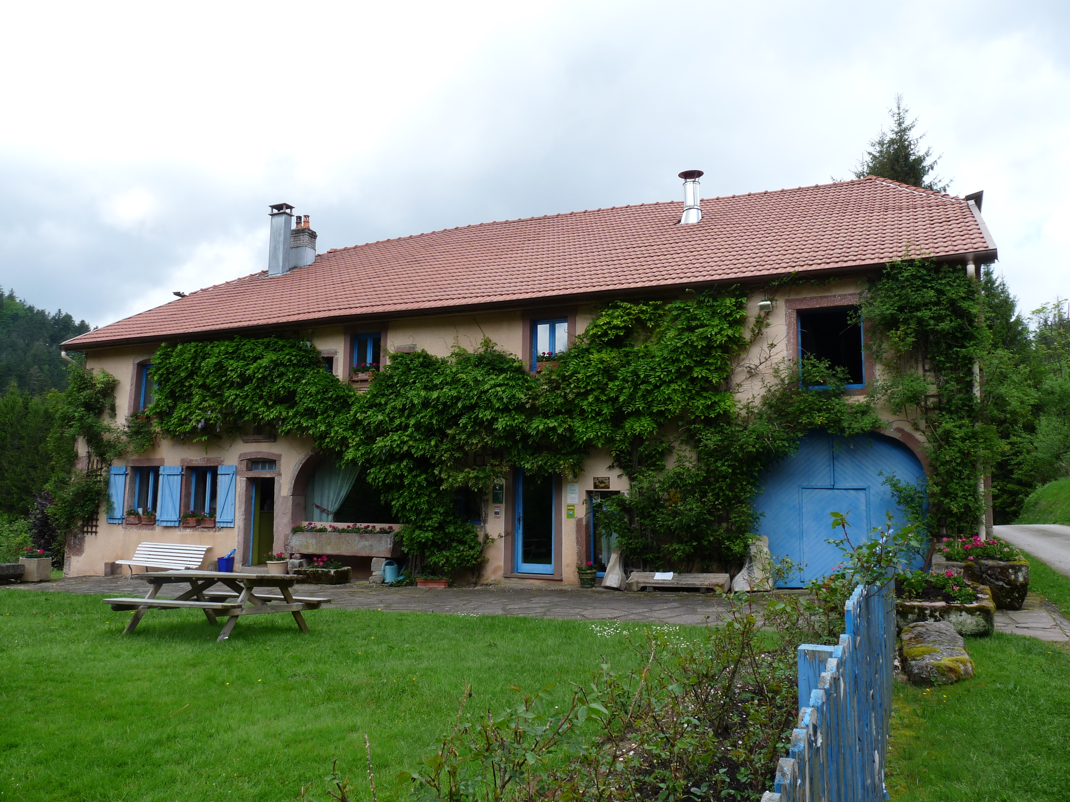 Auberge de la Cholotte à Rouges-Eaux (Vosges)